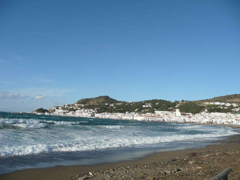 el Port de la Selva (Alt Empordà)